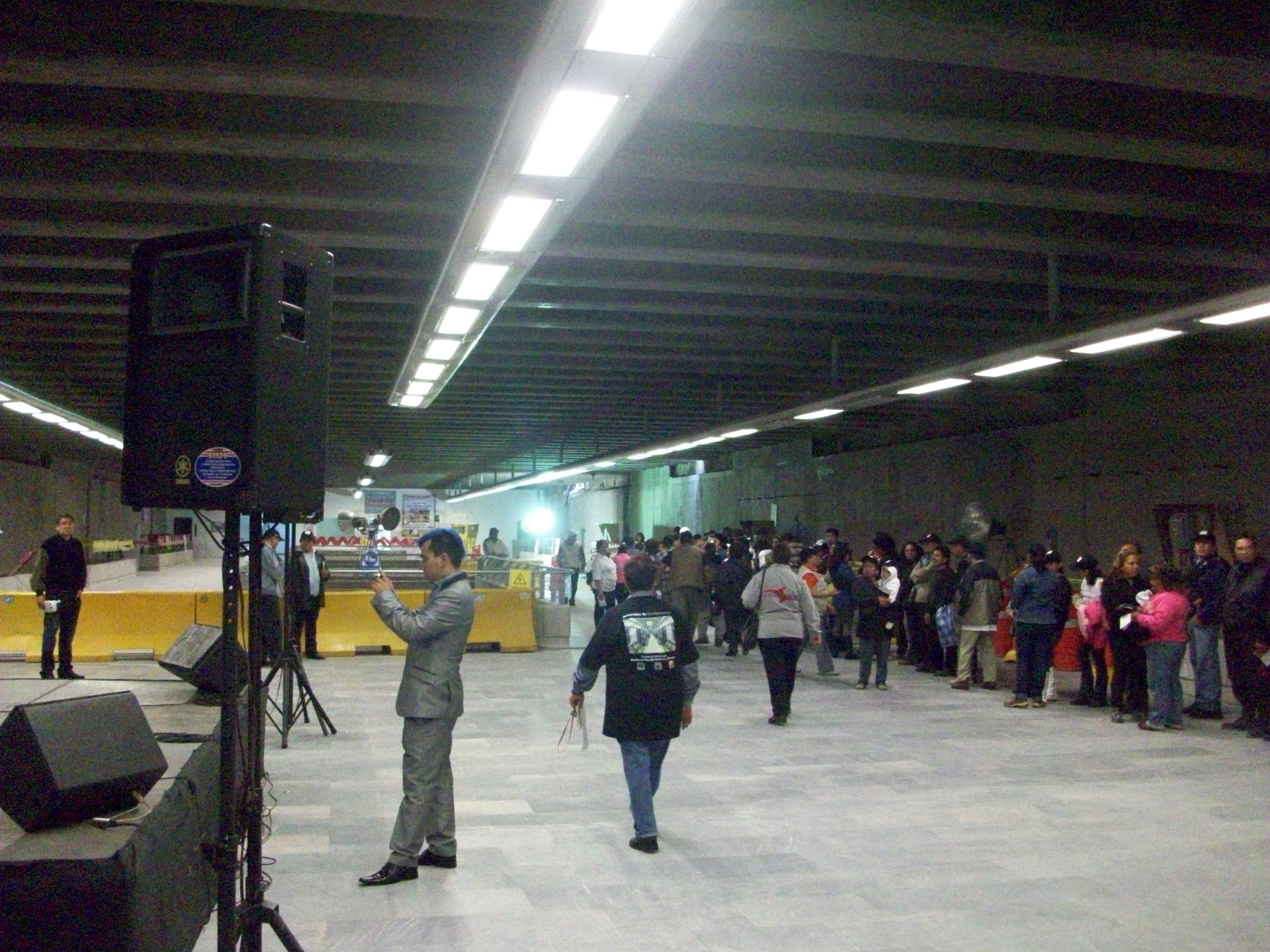 Vestibulo principal estacion mixcoac linea 12 durante el primer dia de pruebas dinamicas.